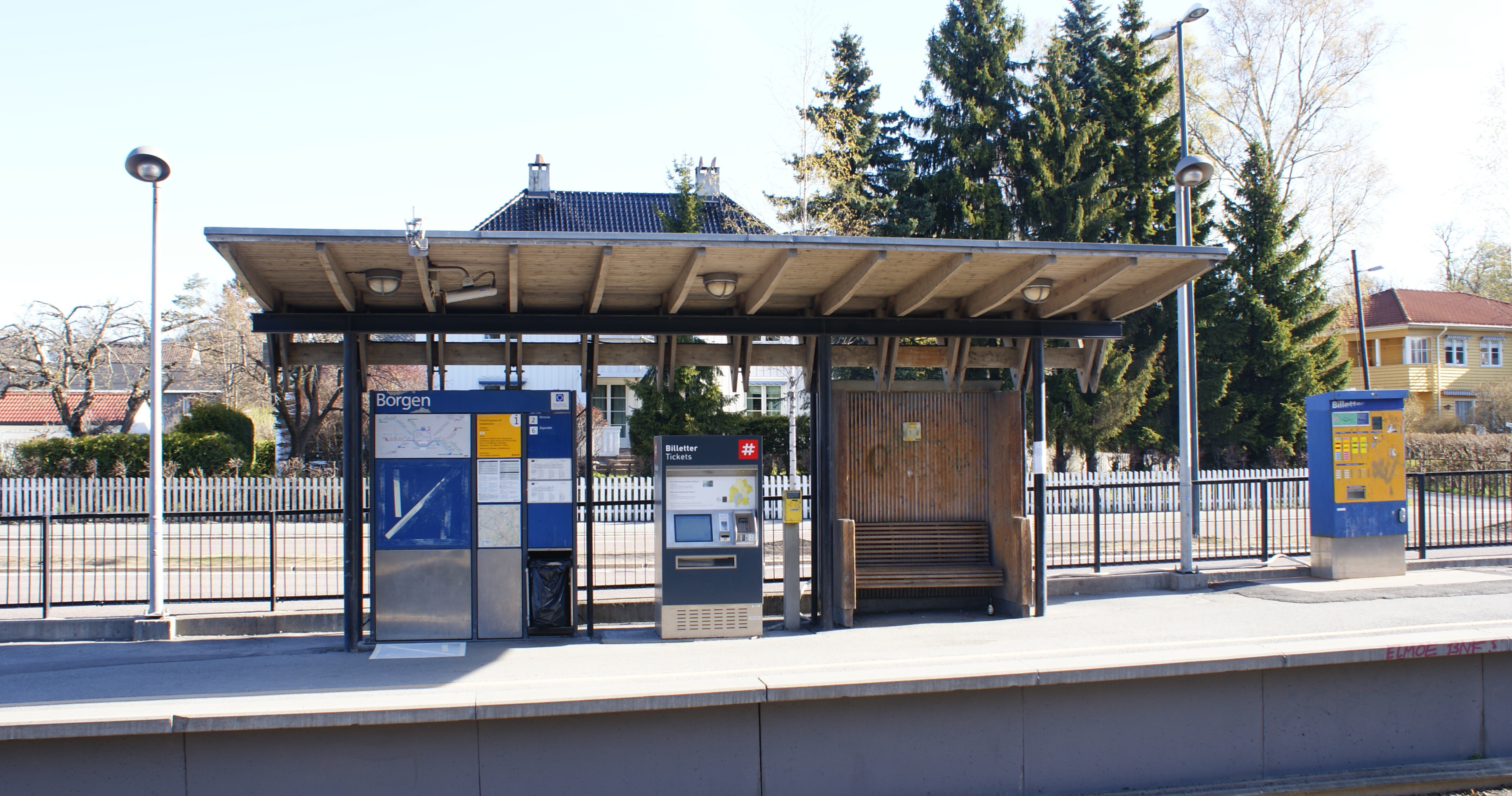 Borgen T-bane station, Borgen, Frogner, Oslo, Norway.